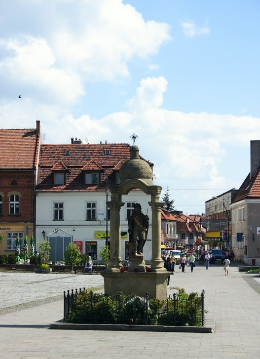 Myślenice (województwo małopolskie)